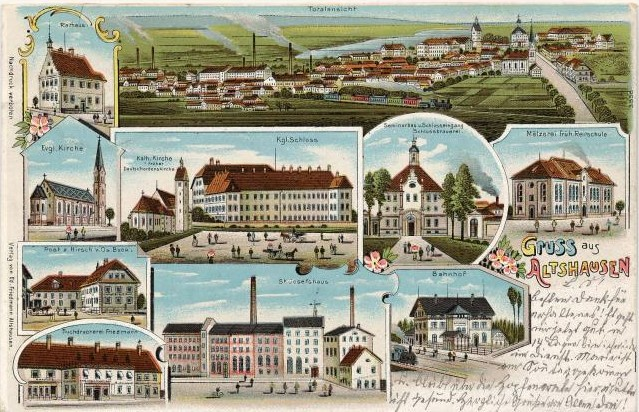 „Gruss aus Altshausen“. Postkarte.